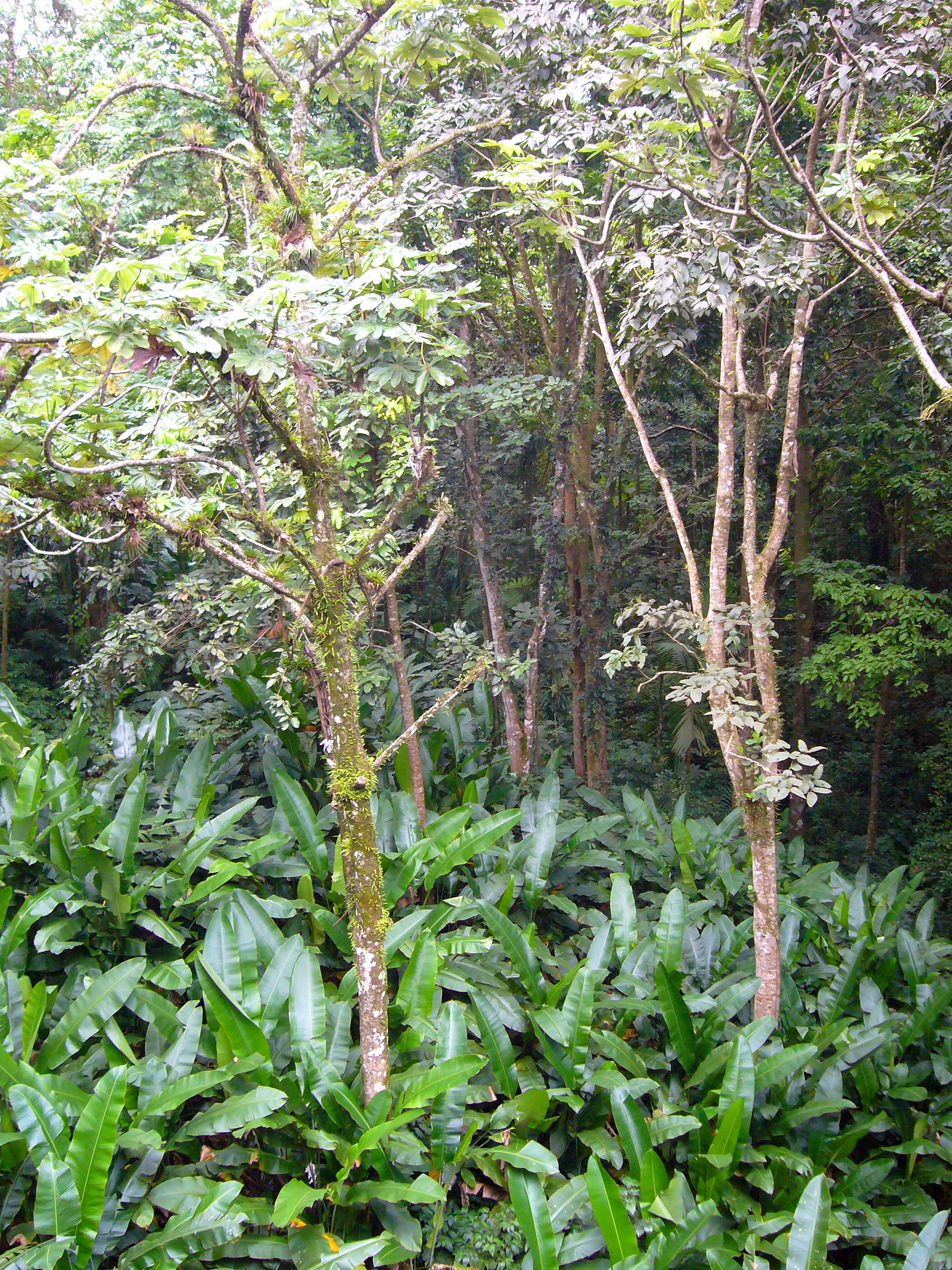 Babonneau rainforest St Lucia